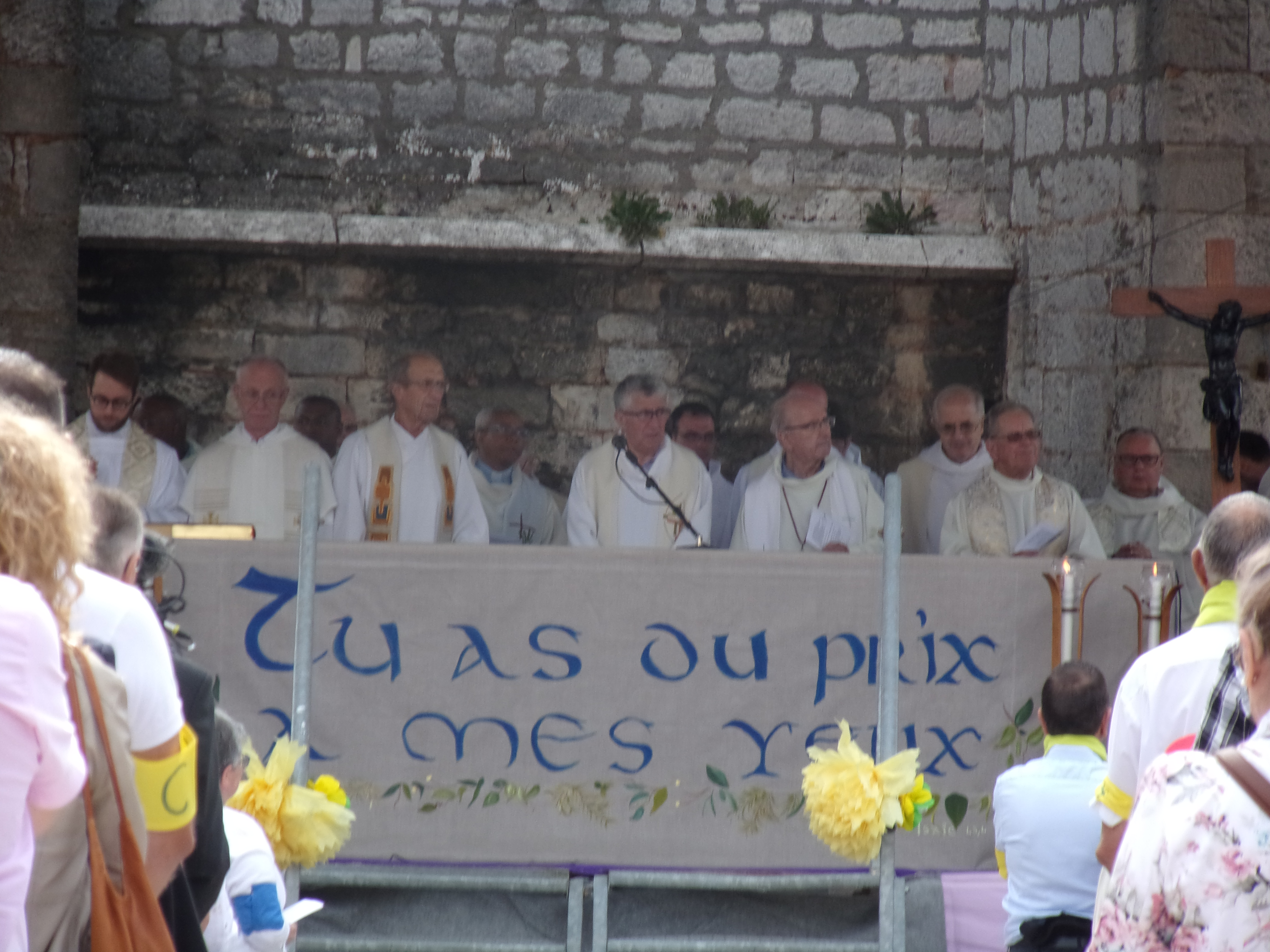 Grand Pardon de Chaumont le 24 juin 2018 : vue de la messe pastorale Place de la Basilique Saint-Jean 9 h 30 - 11 h 30